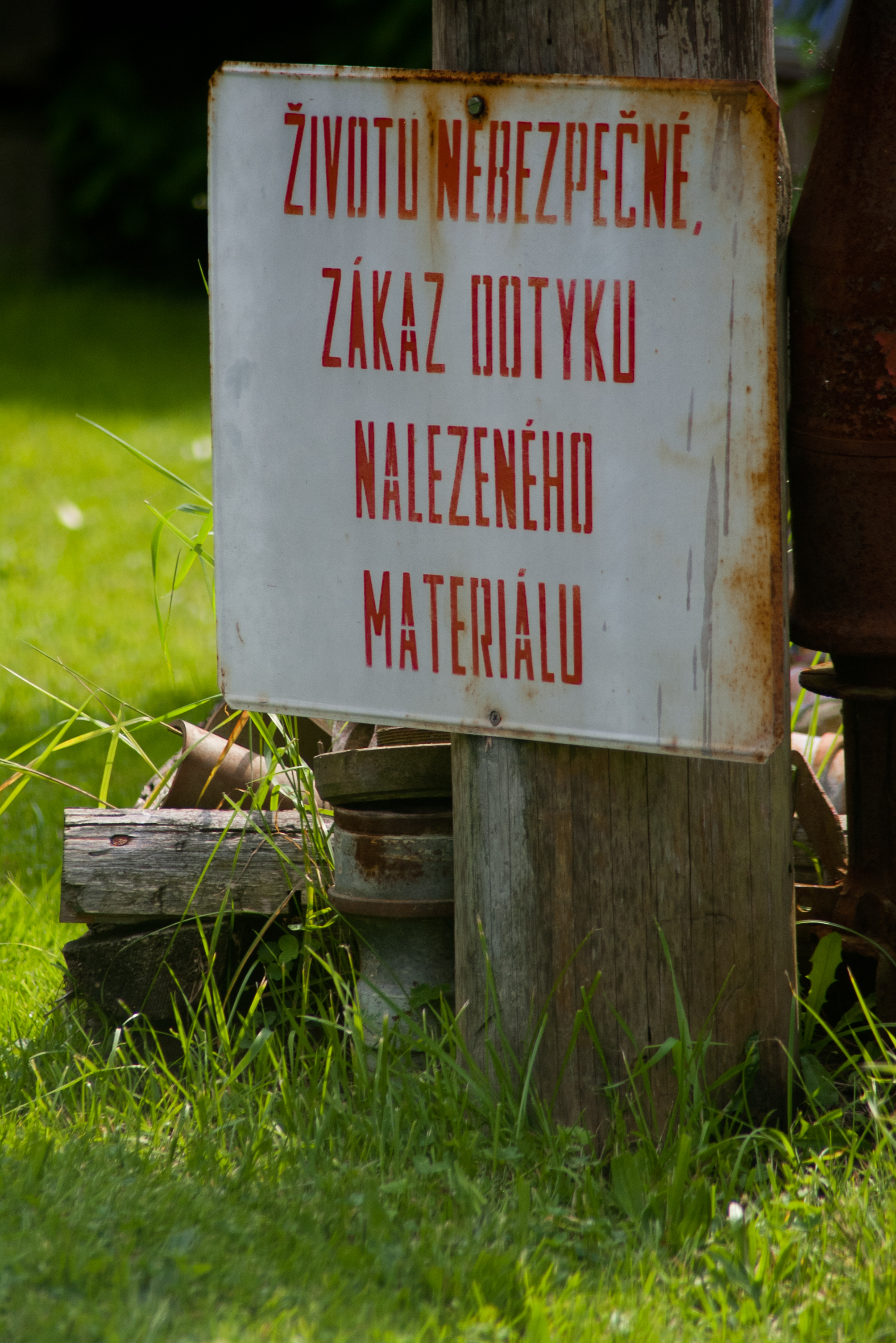 Upozorňovací tabulka.